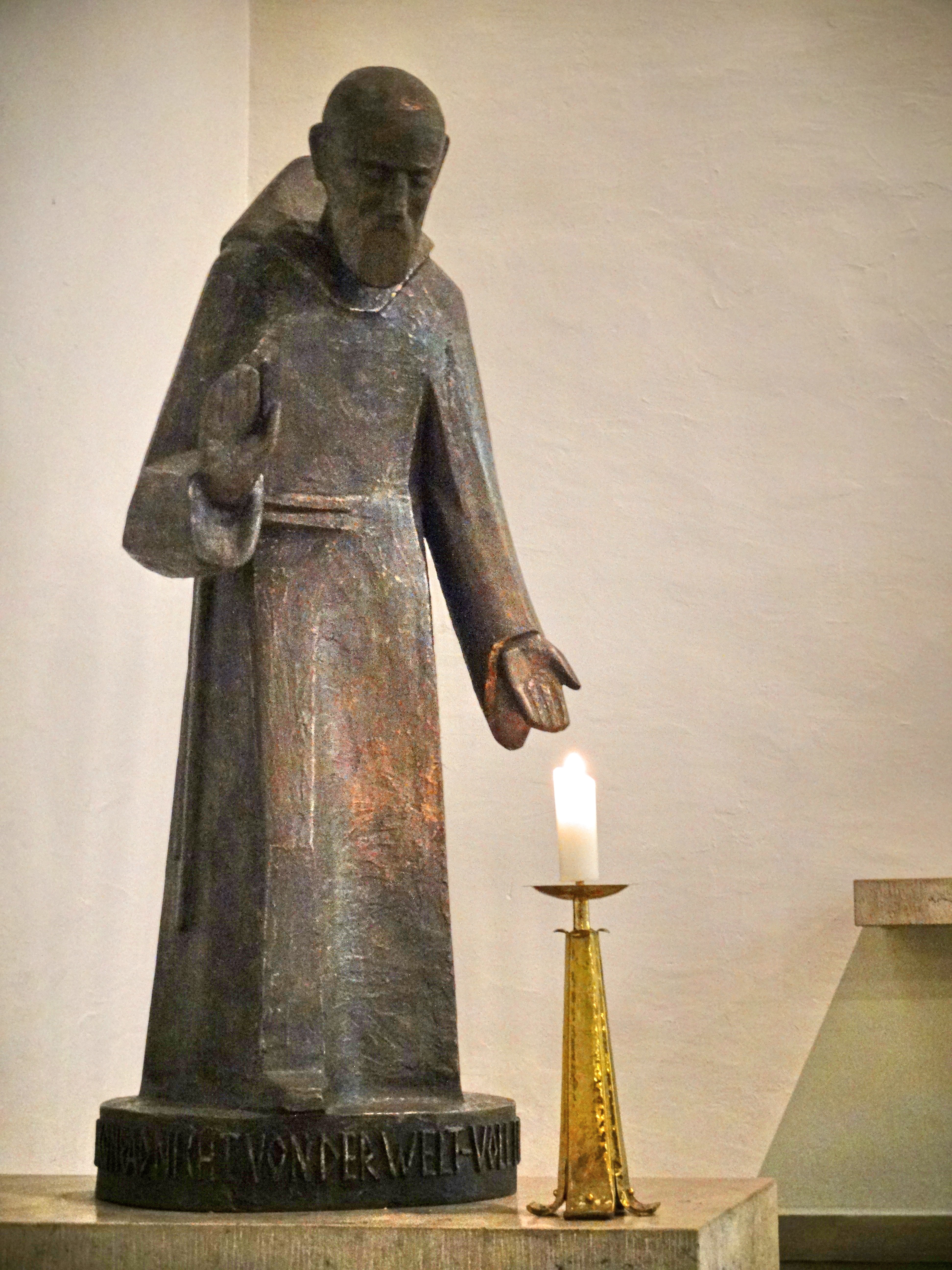 Bruder Konrad (St.-Konrad-Kirche in Hof)